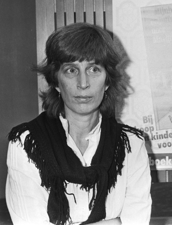 Els Pelgrom